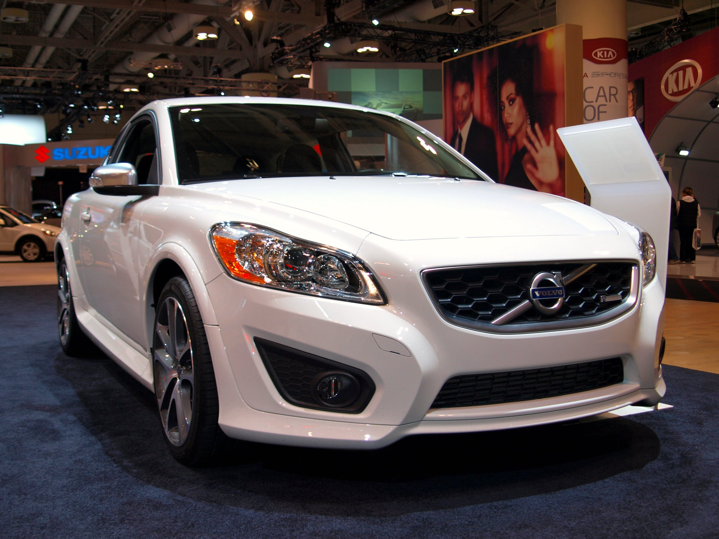 2011 Volvo C30